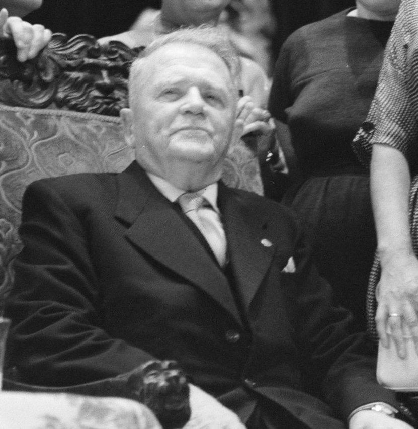 Collectie / Archief : Fotocollectie Anefo Reportage / Serie : [ onbekend ] Beschrijving : Dit is uw Leven in Singermuseum. Cor Bruyn en zijn zes dochters Datum : 5 november 1961 Persoonsnaam : Cor Bruyn Instellingsnaam : Singer Museum Fotograaf : Bilsen, Joop van / Anefo Auteursrechthebbende : Nationaal Archief Materiaalsoort : Negatief (zwart/wit) Nummer archiefinventaris : bekijk toegang 2.24.01.04 Bestanddeelnummer : 913-1457